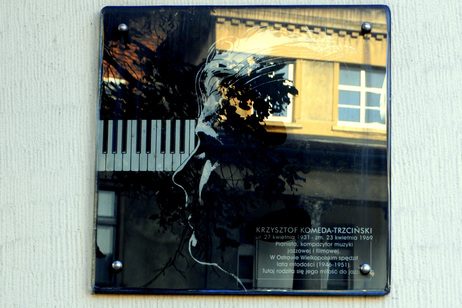 Ostrów Wlkp., Plac Bankowy. Tablica pamiątkowa na ścianie budynku banku w którym mieszkał ( elewacja od strony ul. Kościuszki )